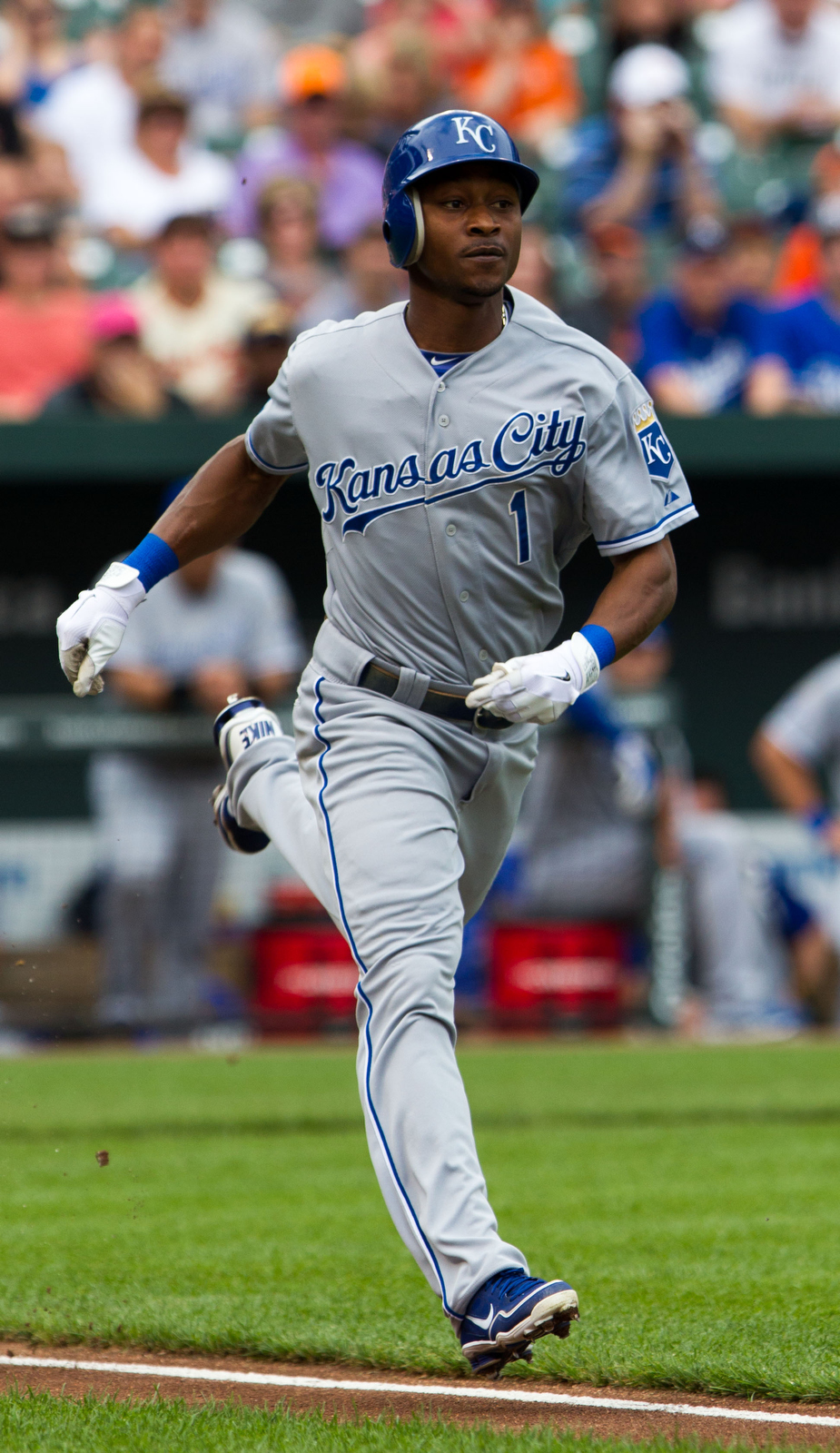 Jarrod Dyson